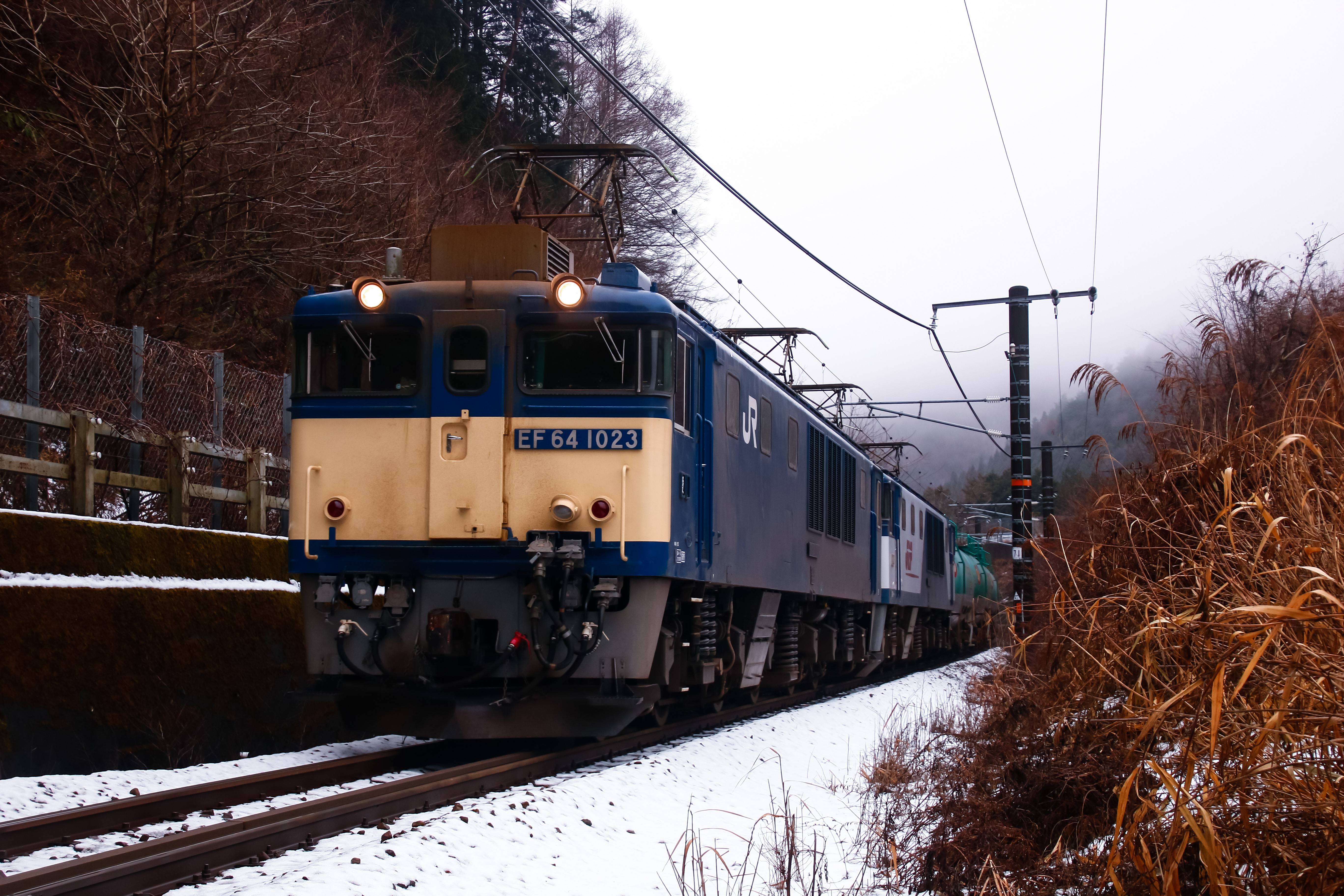 EF64形重連でけん引する貨物列車が、中央本線贄川付近を行く。2018年12月22日撮影。